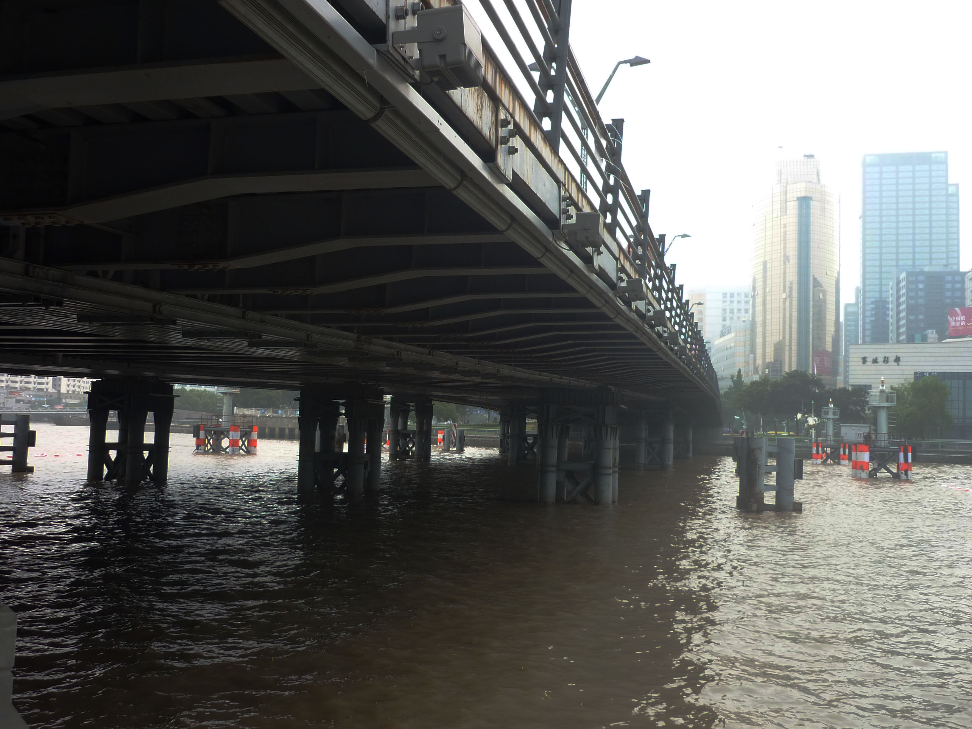 宁波新江桥便桥